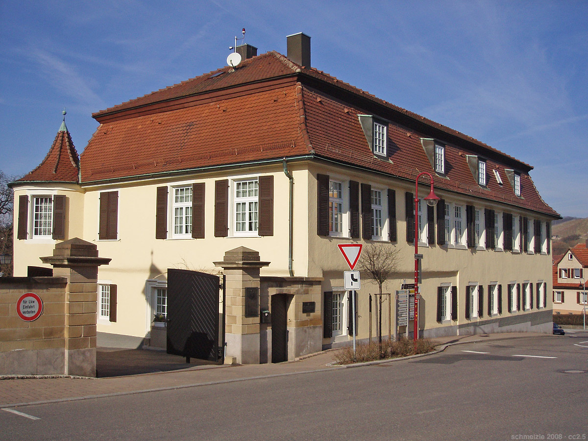 Schloss in Obersulm-Affaltrach